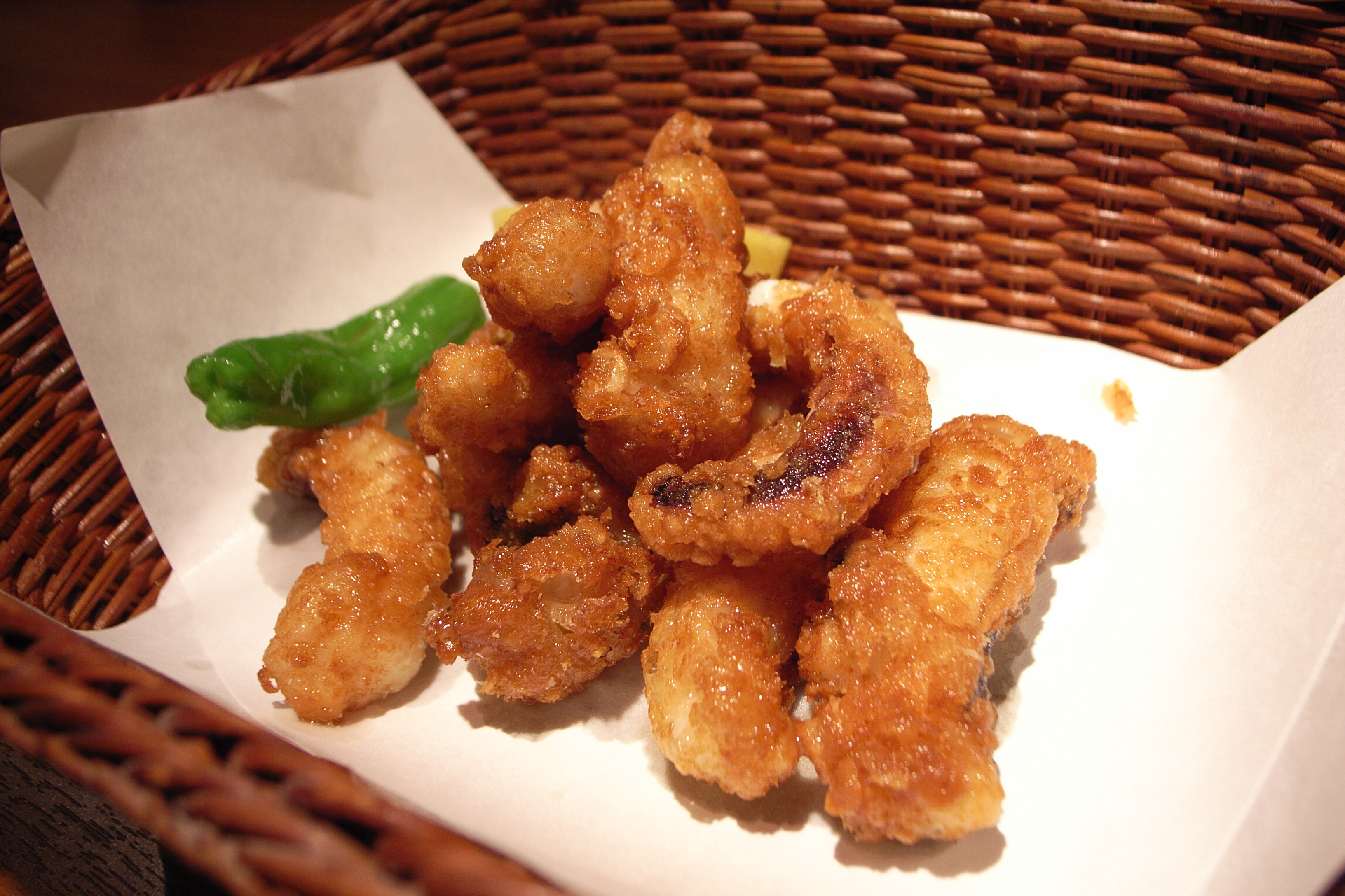 タコの唐揚げ